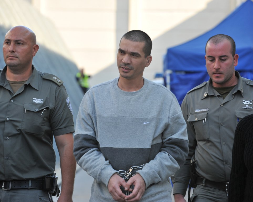 יצחק אברג'יל במהלך הסגרתו לארצות הברית. צילום: מערך דובר המשטרה